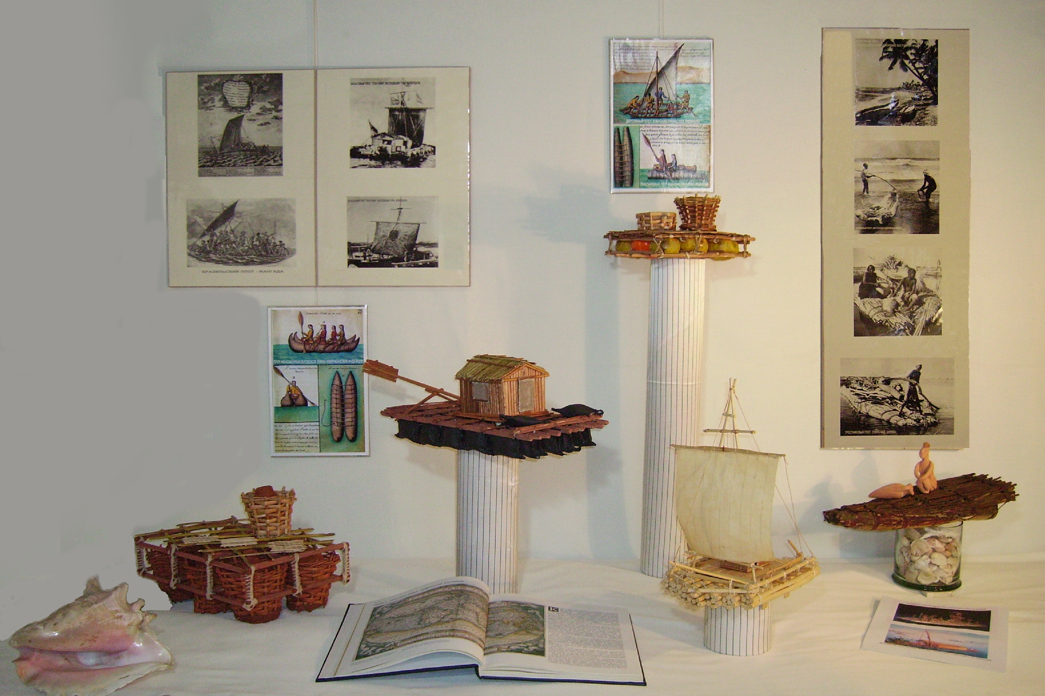 Одна из витрин выставки "Древнее мореплавание", посвящённая бальсовым плотам и походам Тура Хейердала.